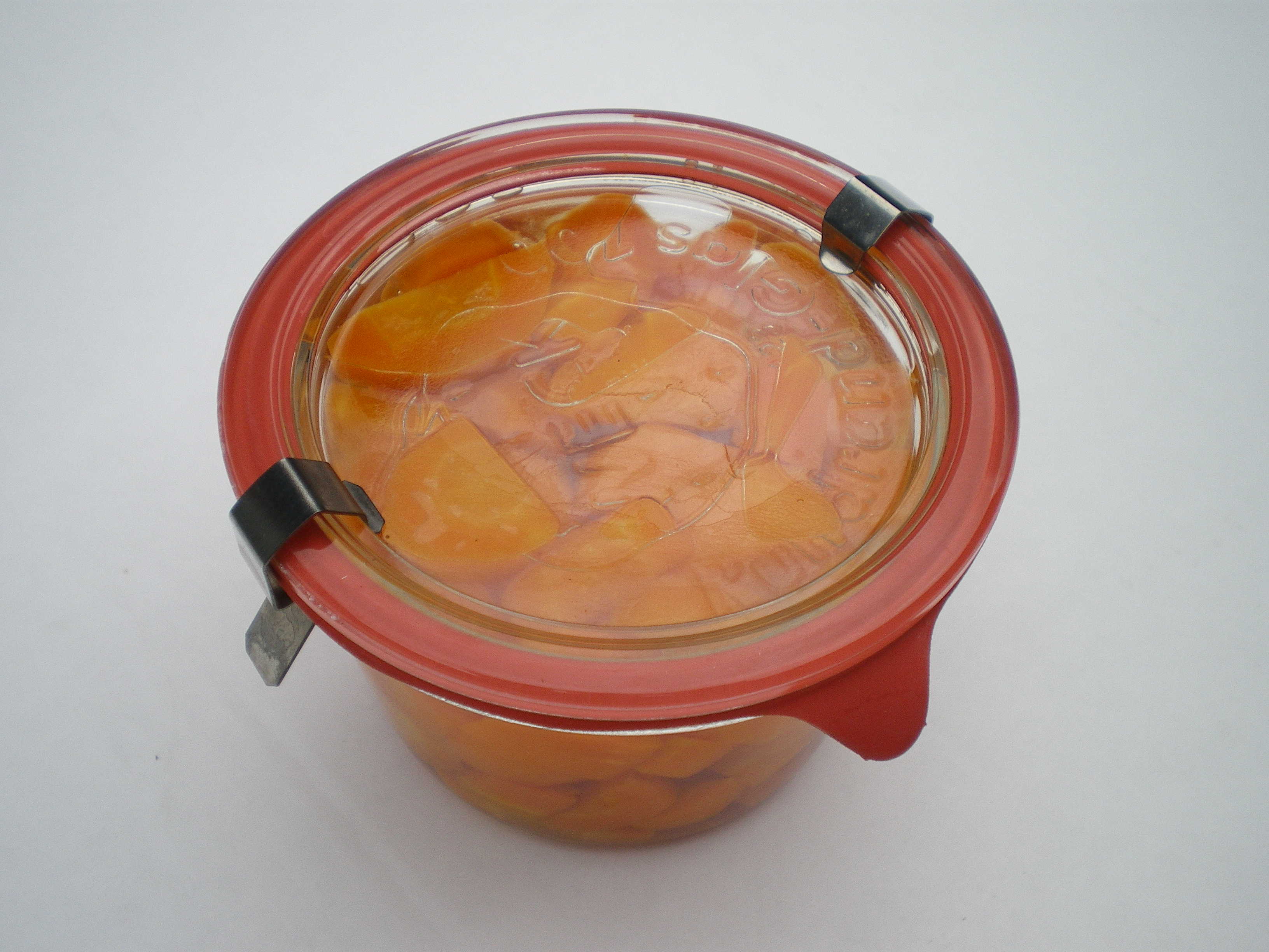 Weckglas, 1/4 l, mit frisch eingekochten Karotten. Die für den Einkochvorgang erforderlichen Federstahlklammern sind noch nicht entfernt.